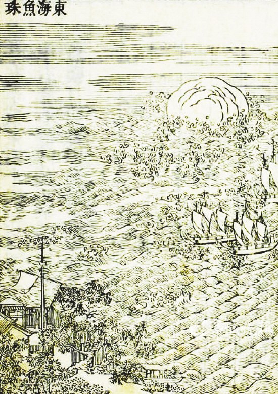 清朝乾隆年间“羊城八景”之一“东海鱼珠”木刻画，出自仇巨川所著《羊城古钞》